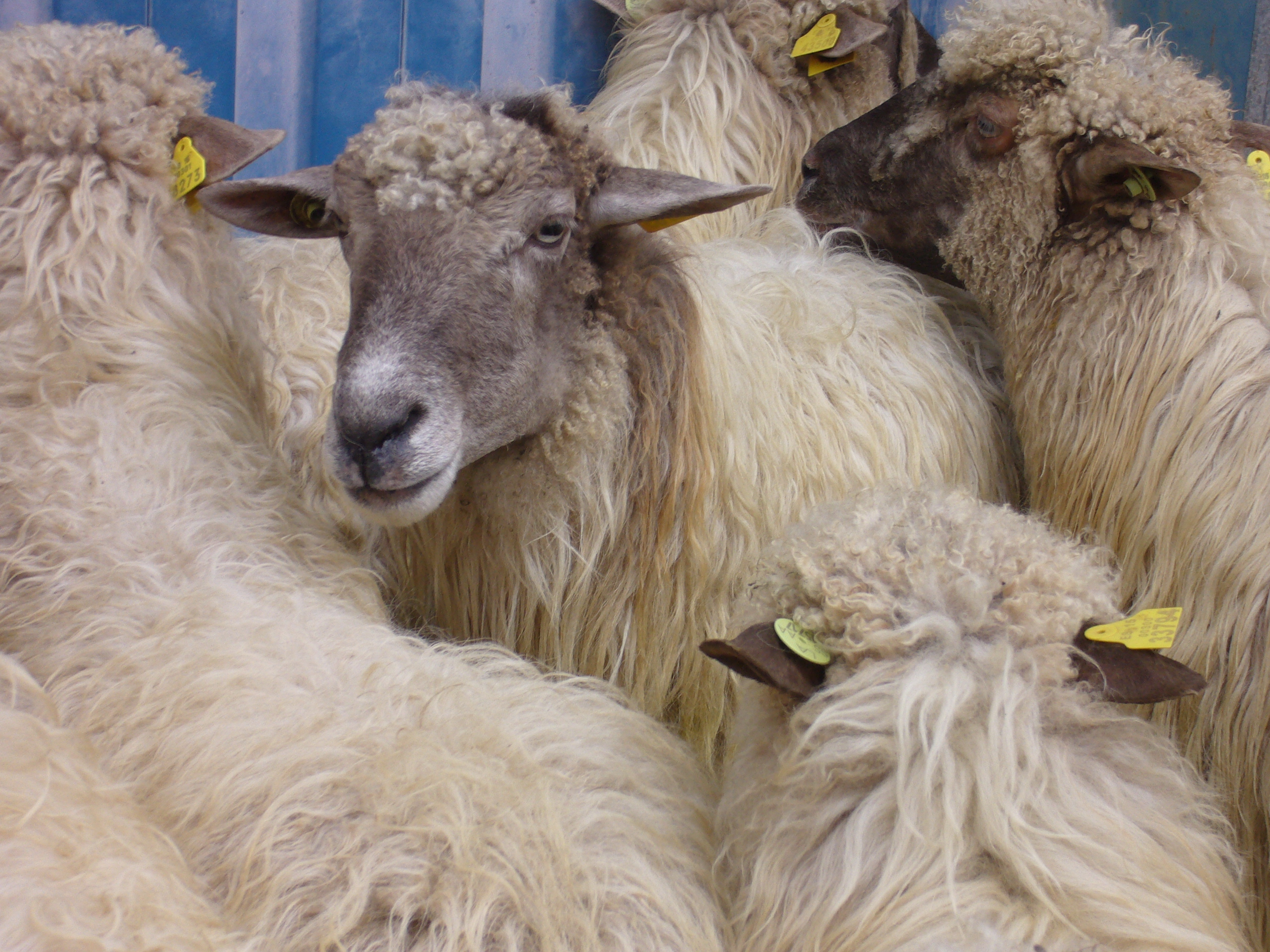 Ardi latxa burubeltza Itziarreko azokan